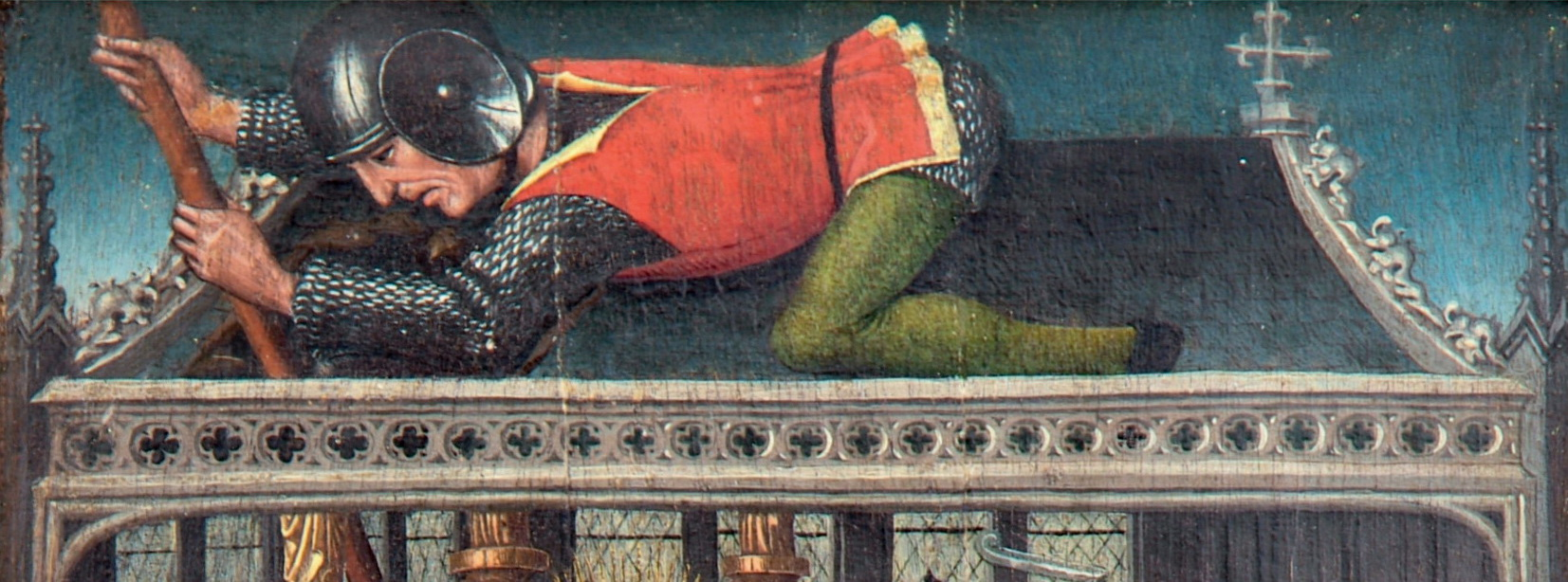 Detail van het zogenaamde Palude-diptiek, een tweeluik uit de late 15e eeuw, toegeschreven aan Jan van Brussel, in het museum Grand Curtius in Luik. Hier: de moordenaar op het dak, een detail van De moord op Sint-Lambertus op de binnenkant van het rechterpaneel.